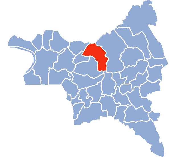 Auteur Hervé SUAUDEAU Licensing Catégorie:Cartes de Seine-saint-Denis